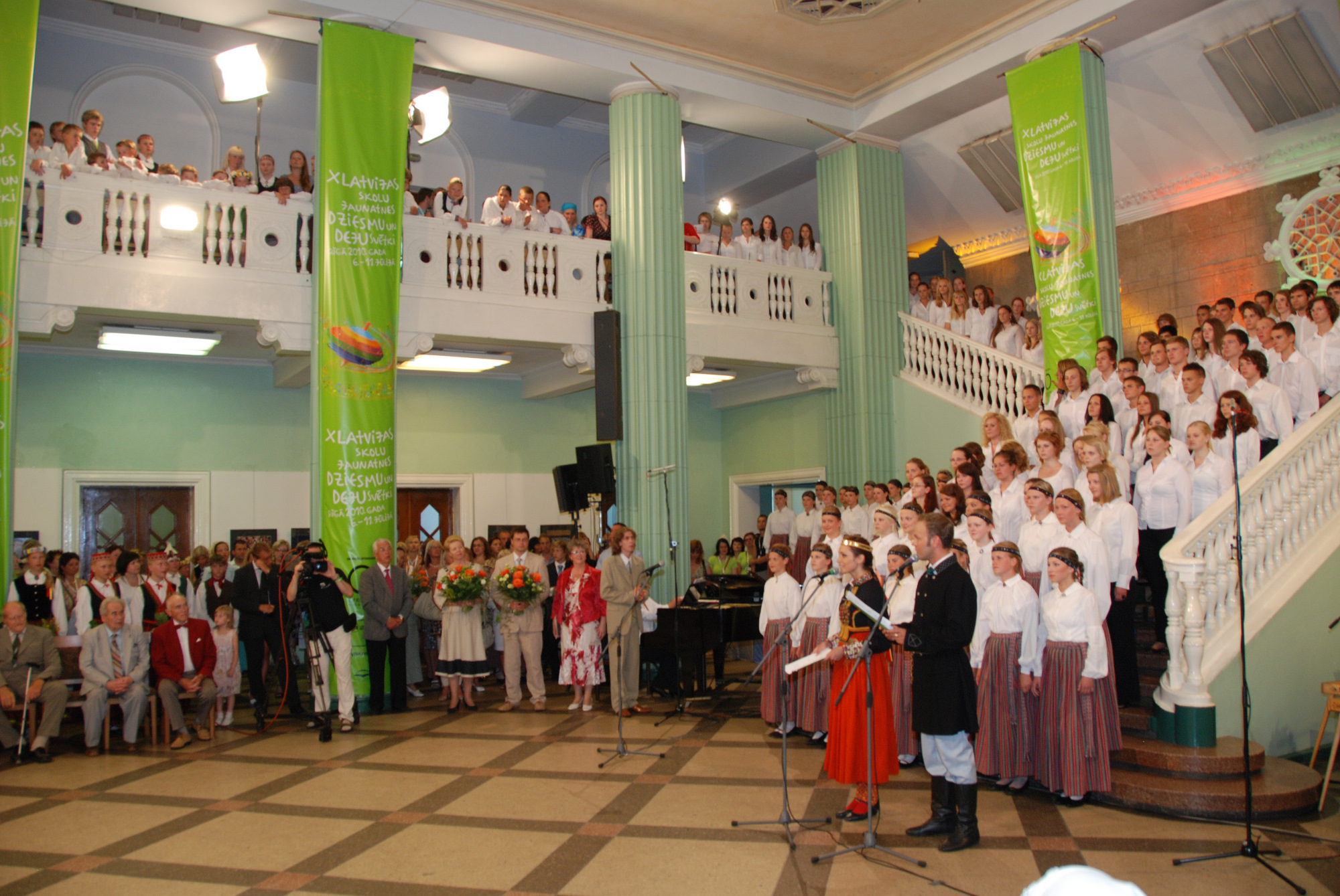 X Latvijas skolu jaunatnes dziesmu un deju svētku atklāšana